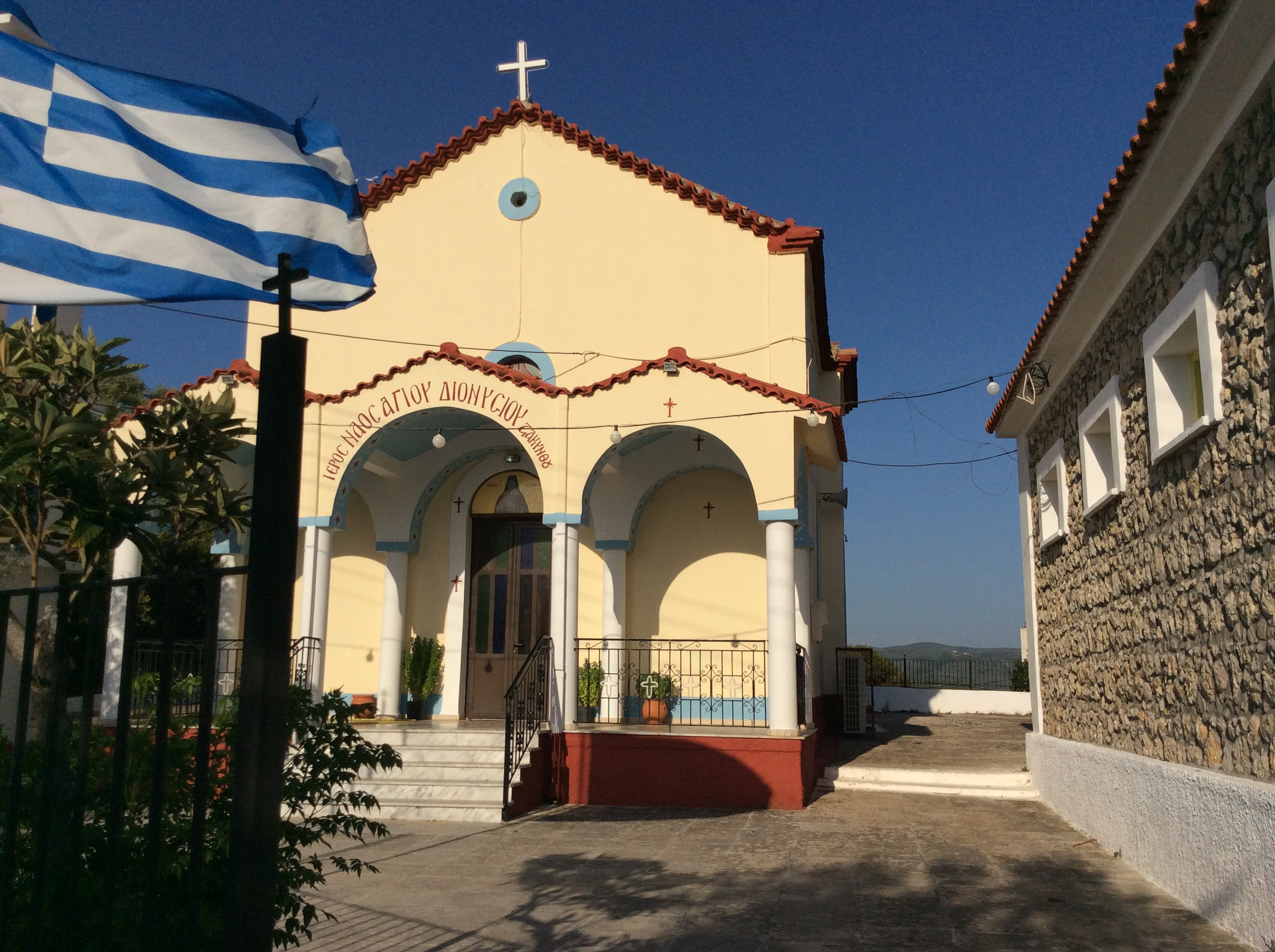 Ο Ιερός Ναός του Αγίου Διονυσίου Ζακύνθου.